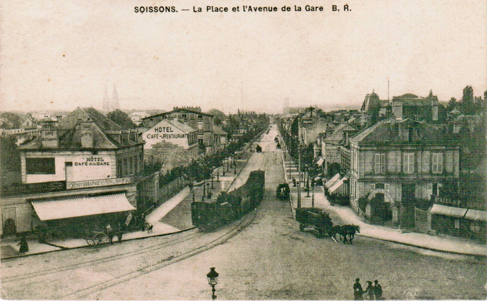 Carte postale ancienne éditée par BRSOISSONS : la Place et l'Avenue de la GareLe convoi d'intérêt local est sans doute un train des Chemins de fer de la Banlieue de Reims (CBR)